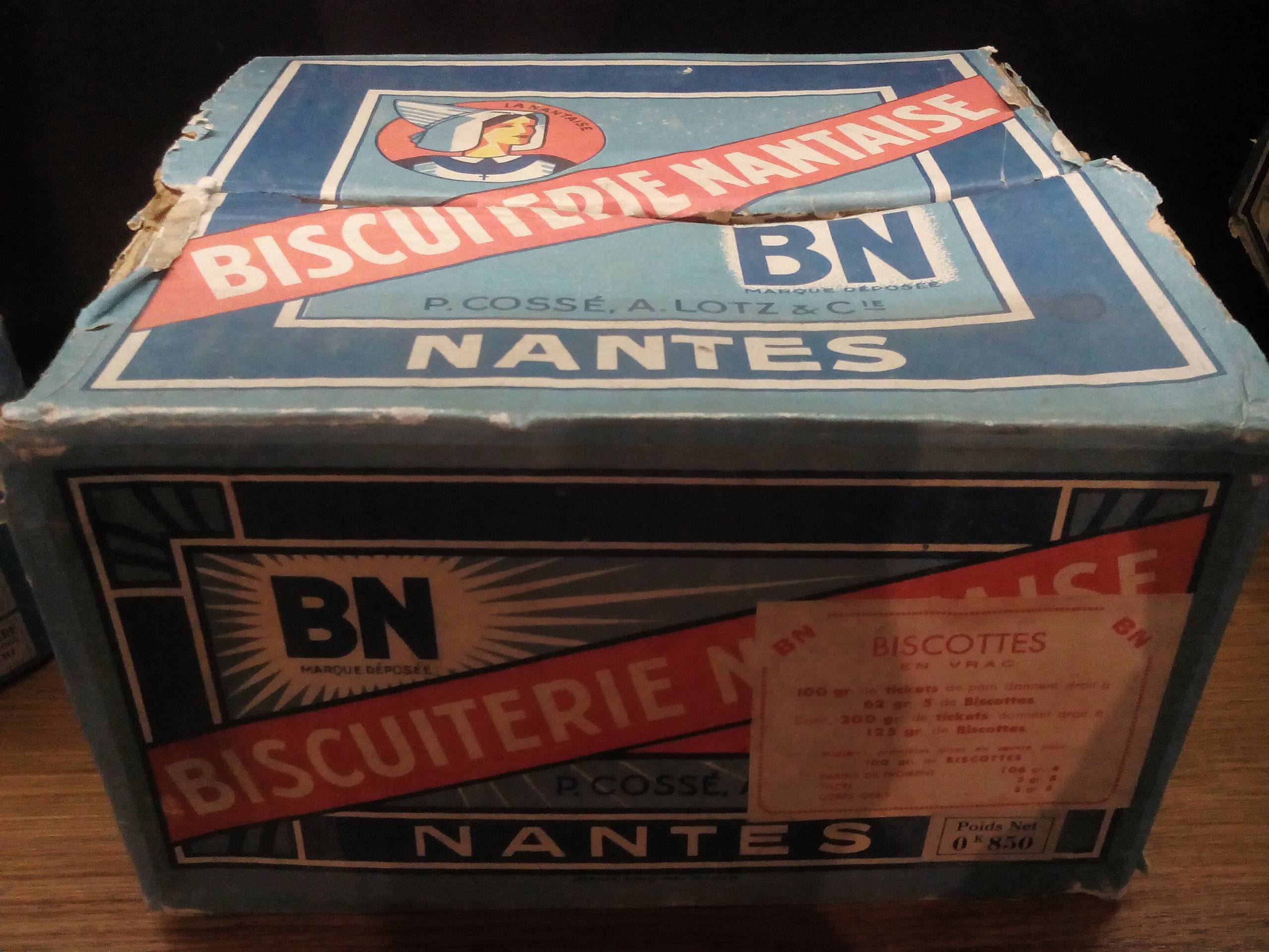 Boîte de "biscottes en vrac" de marque Biscuiterie Nantaise, seconde guerre mondiale